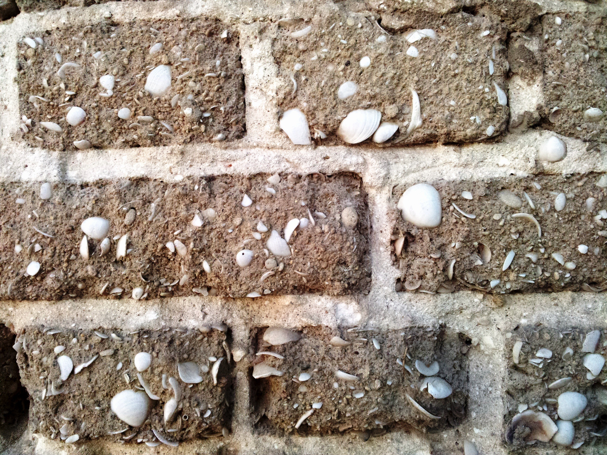 קיר לבנים שהוכנו מזיפזיף, ברחוב שלוש בנווה צדק